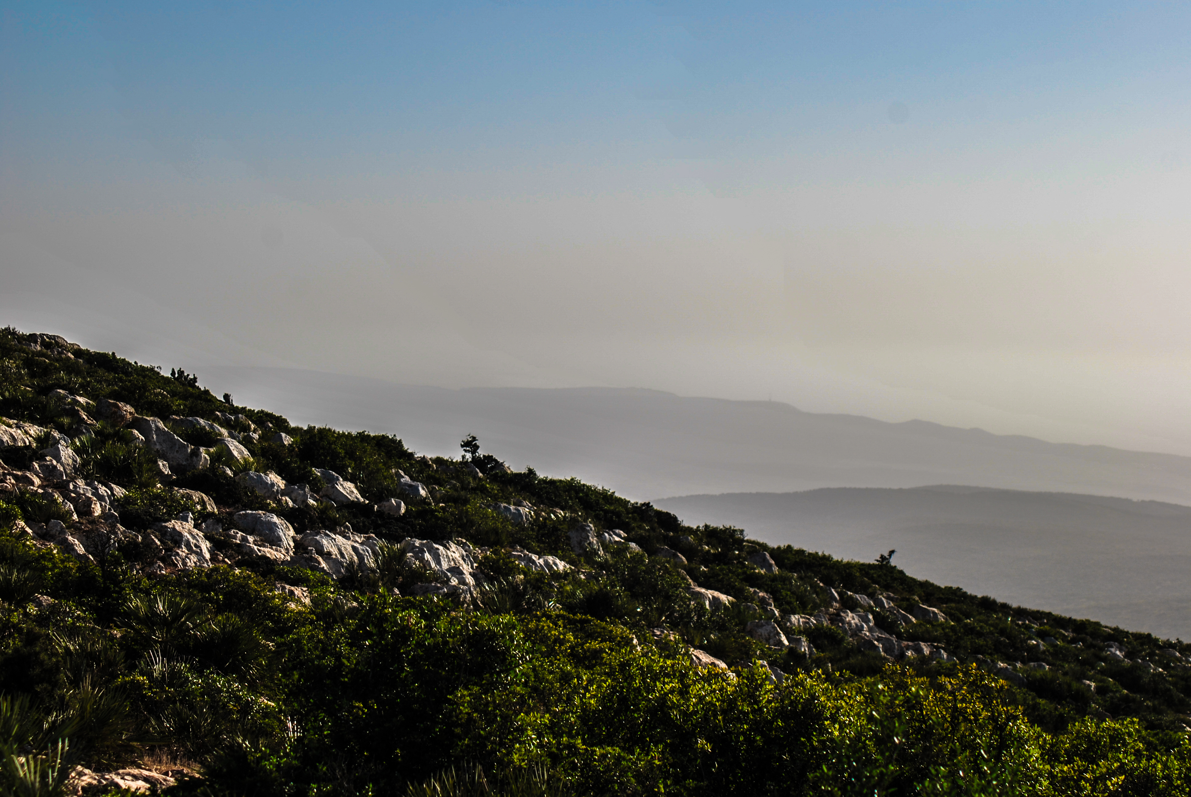 ghabet dada essaouira douar el fayda aain hjer akkermoud